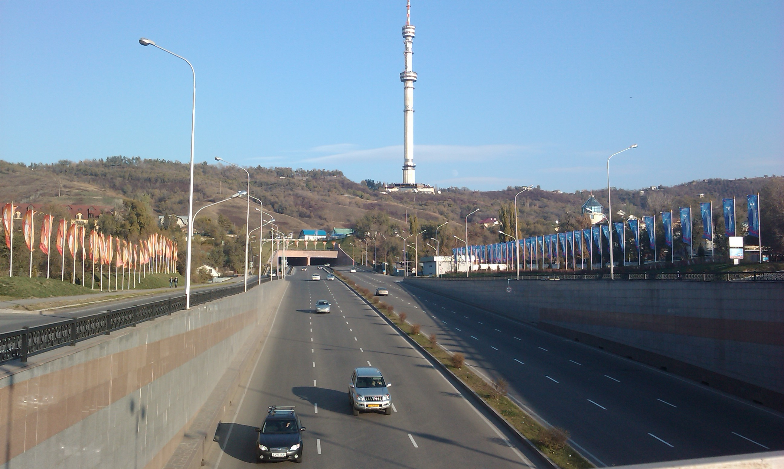 Вид Кок-Тюбе с кольцевой дороги Аль-Фараби-Достык